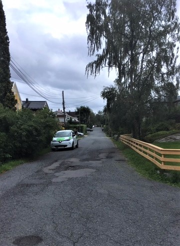 Seterveien Oslo august 2019